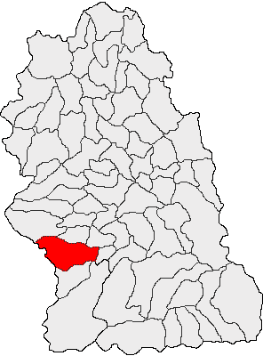 Categorie:Hărţi ale judeţului Hunedoara